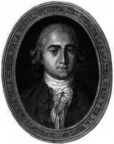 Retrato de Vicente_García_de_la_Huerta